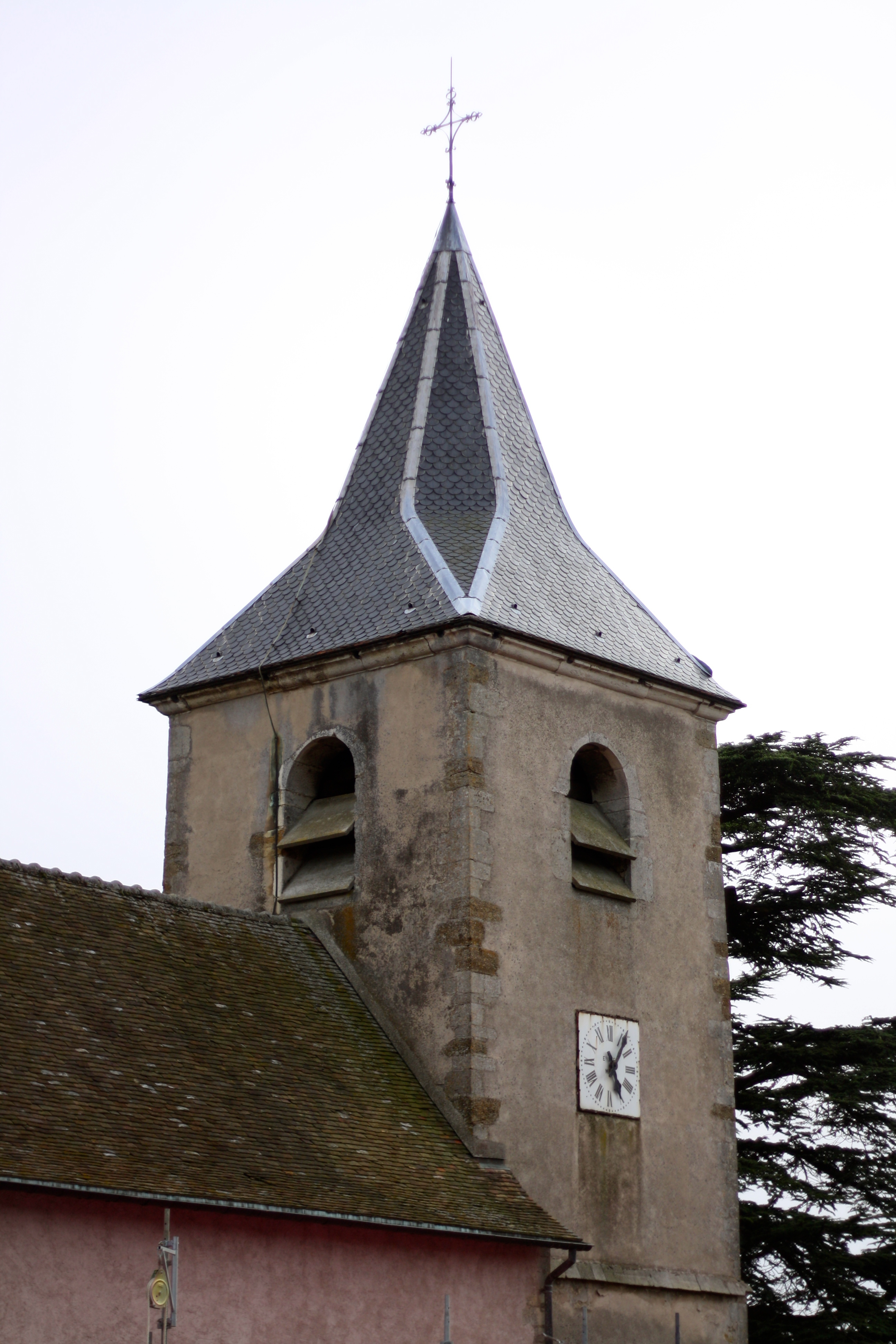 Église Saint-Jean-Baptiste d'Amance : clocher .